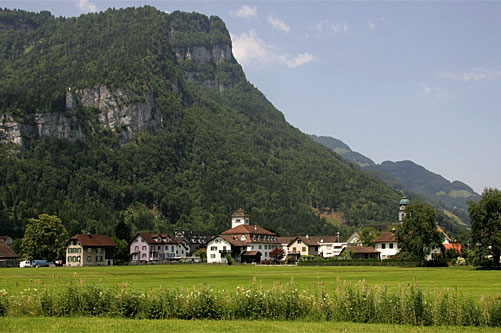 Näfels